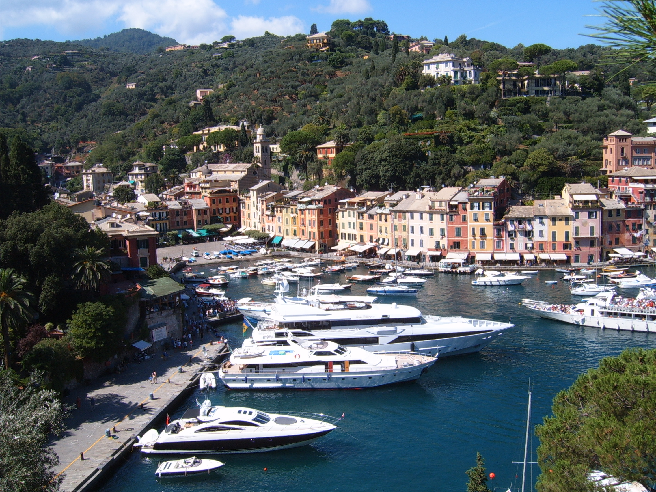 Portofino Bay, Riviera di Levante, Italy